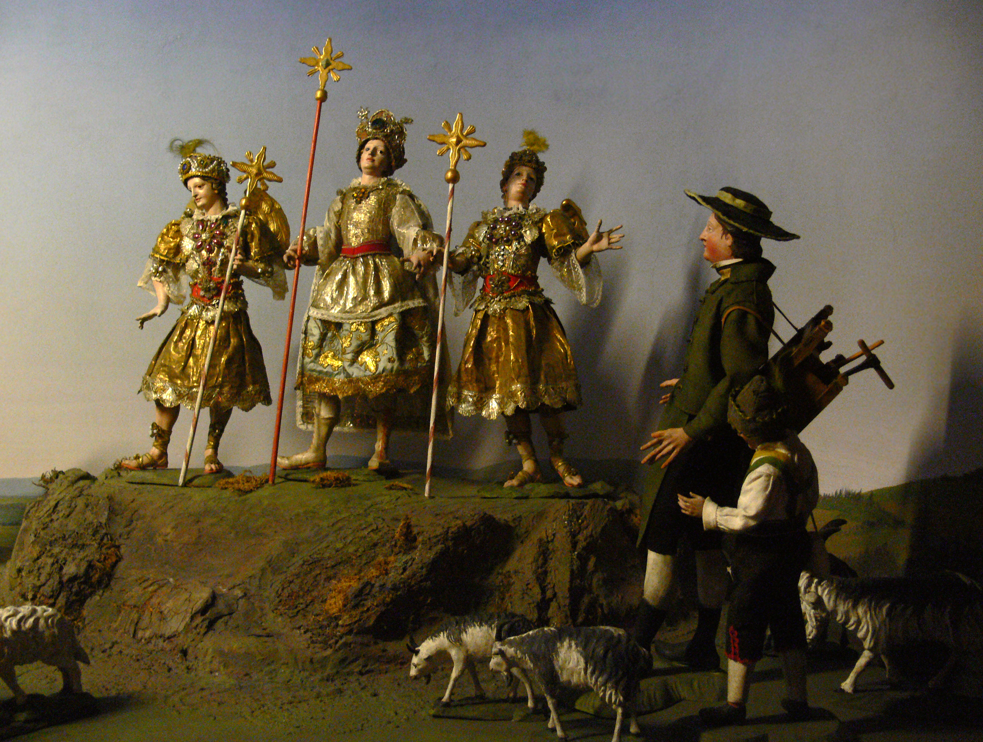 Verkündigung an die Hirten, Nordtirol, Mitte 18. Jahrhundert; Ehemalige Klosterkrippe des Stifts Stams; Krippensammlung des Bayerisches Nationalmuseums